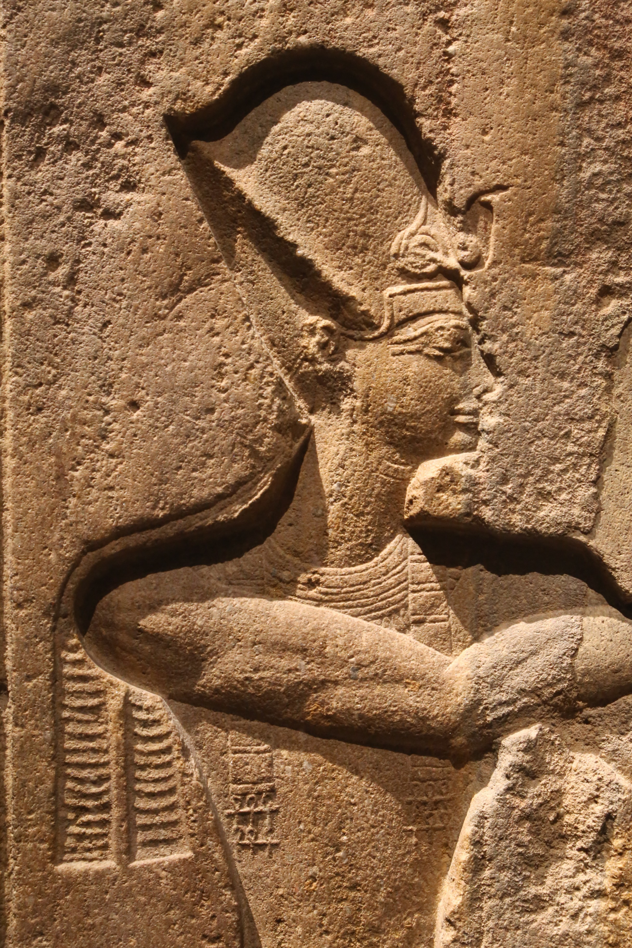 Tempelrelief: Pharao Ramses II. beim Gebet, Memphis, 1250 v. Chr., Sandstein